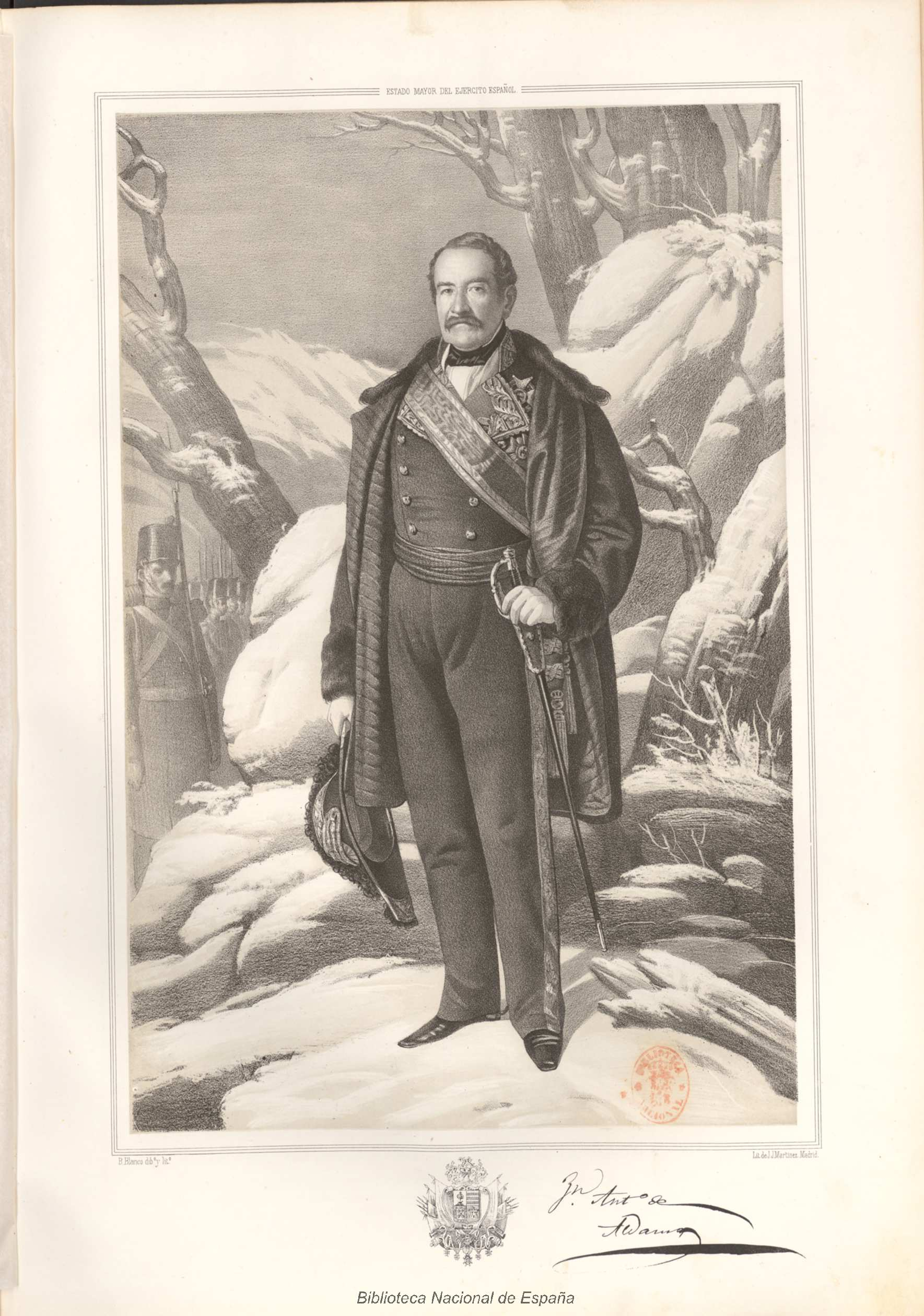 Juan Antonio Aldama. Dibujo y litografía de Bernardo Blanco para "Estado Mayor General del Ejército